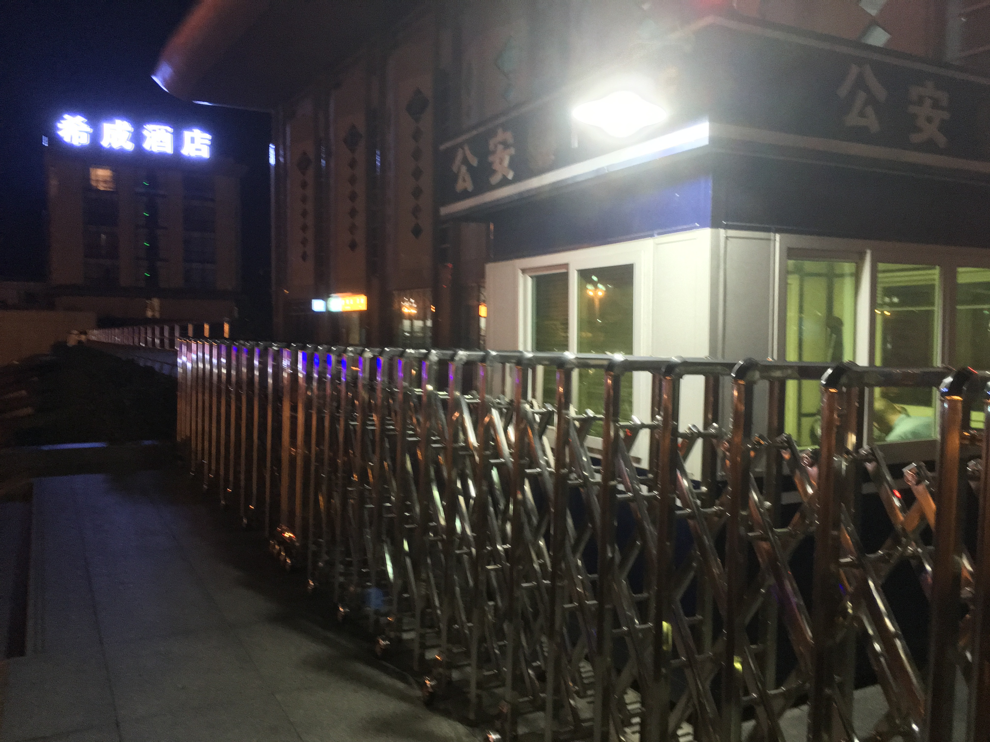 iphone se拍摄